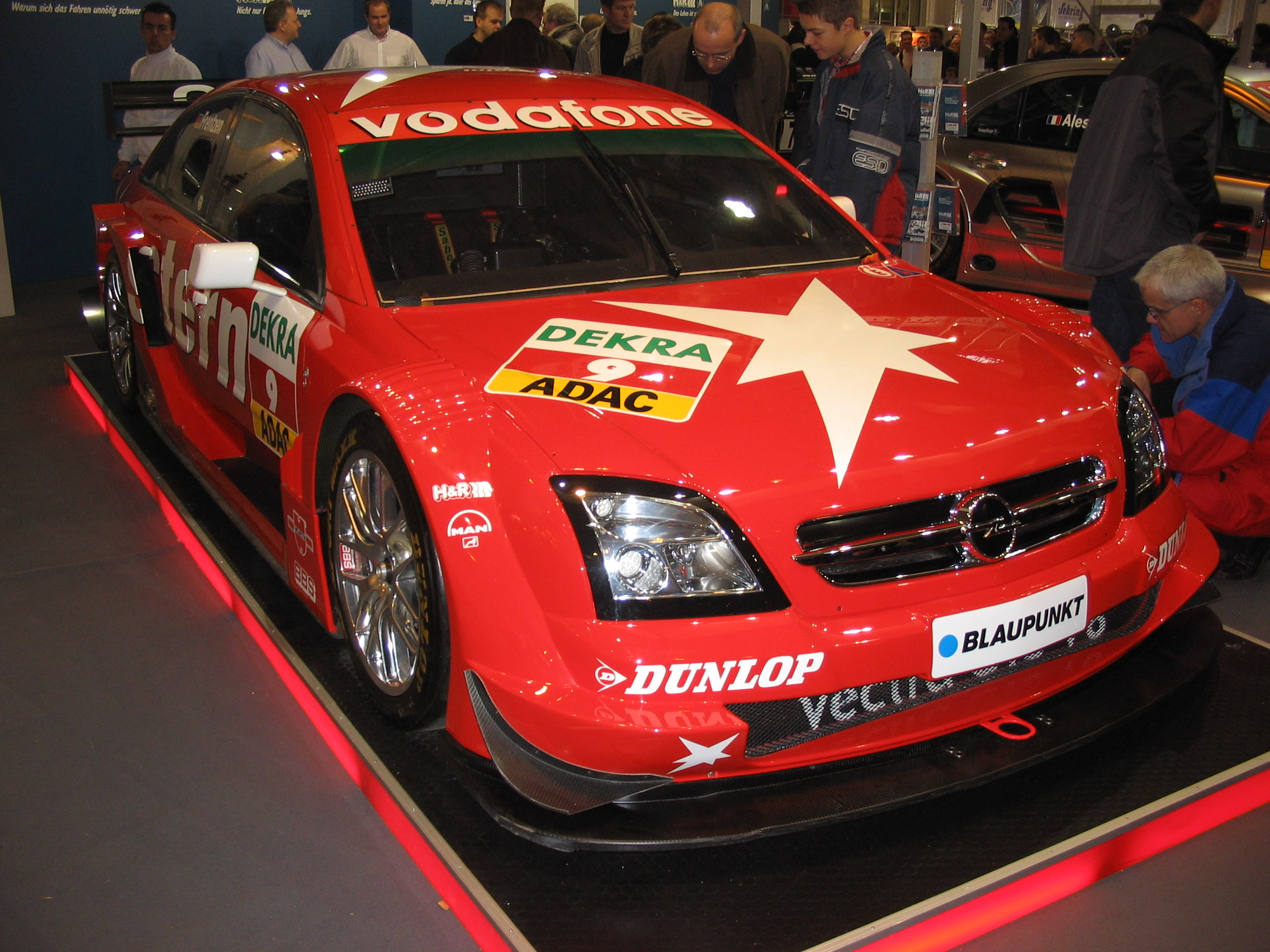 Heinz-Harald Frentzen's Opel Vectra DTM at the Motor Show Essen 2005.